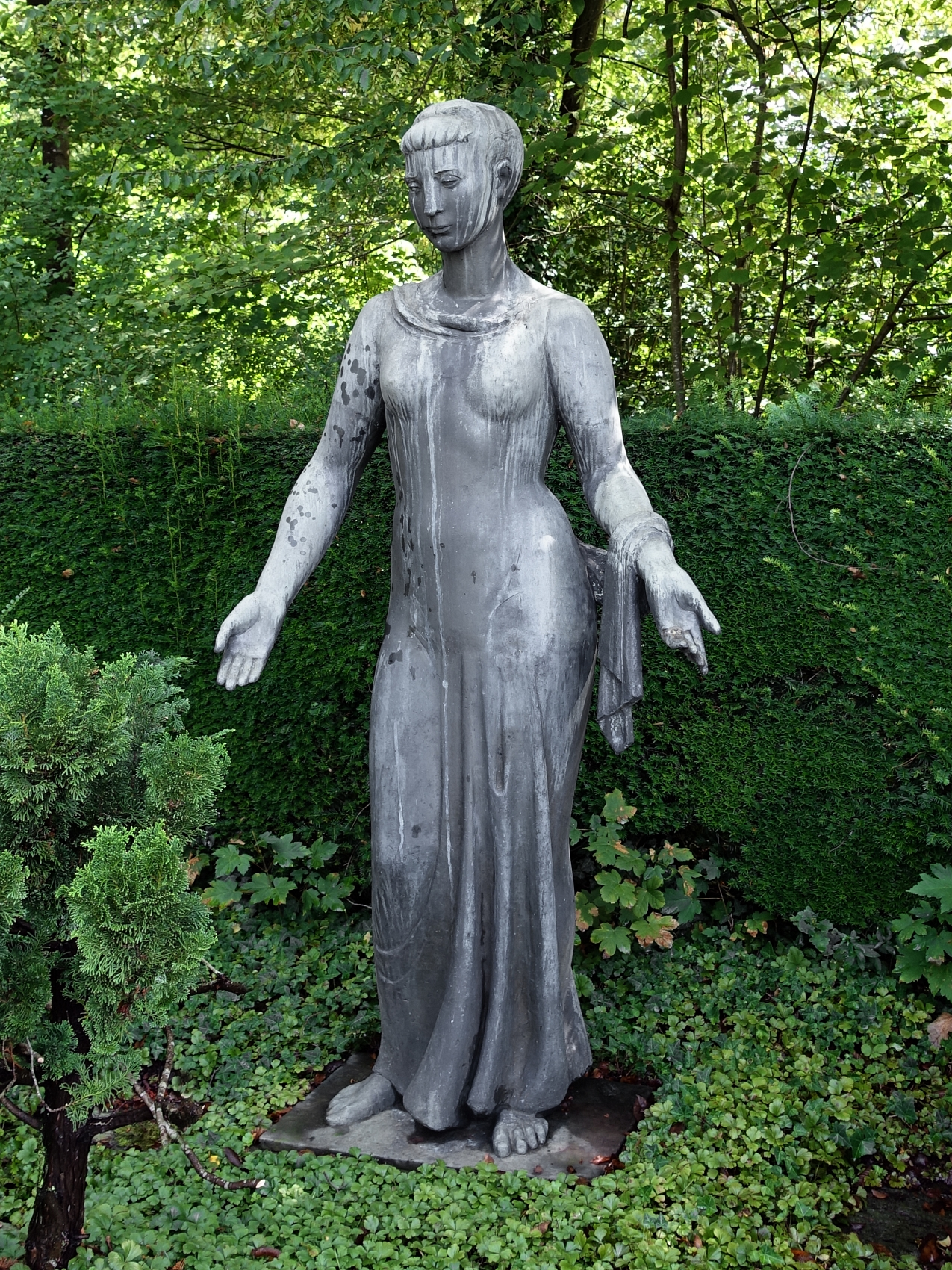 Skulptur von Adolf Glatt (1899–1984) für Mina Junker-Zimmer (1903-1949) auf dem Friedhof am Hörnli, Basel.